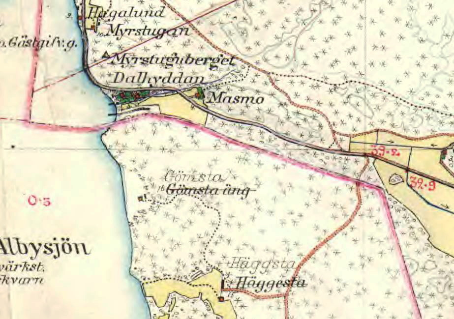 Del av Häradsekonomiska kartan över Gömsta äng